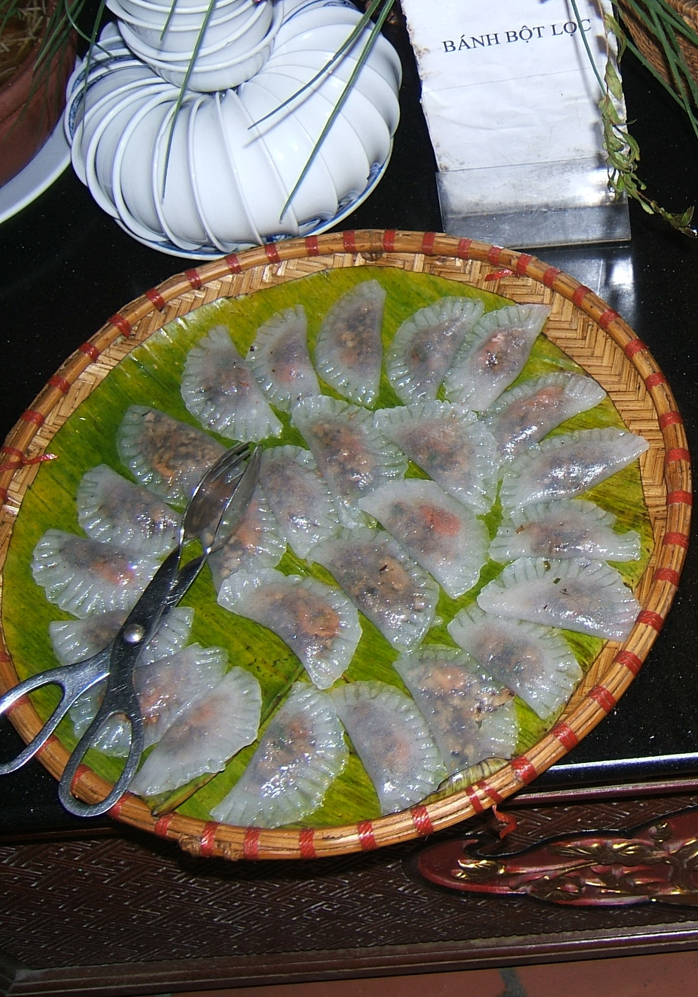 Một đĩa bánh bột lọc (Khương Việt Hà chụp tại Quán Sen, Hà Nội)